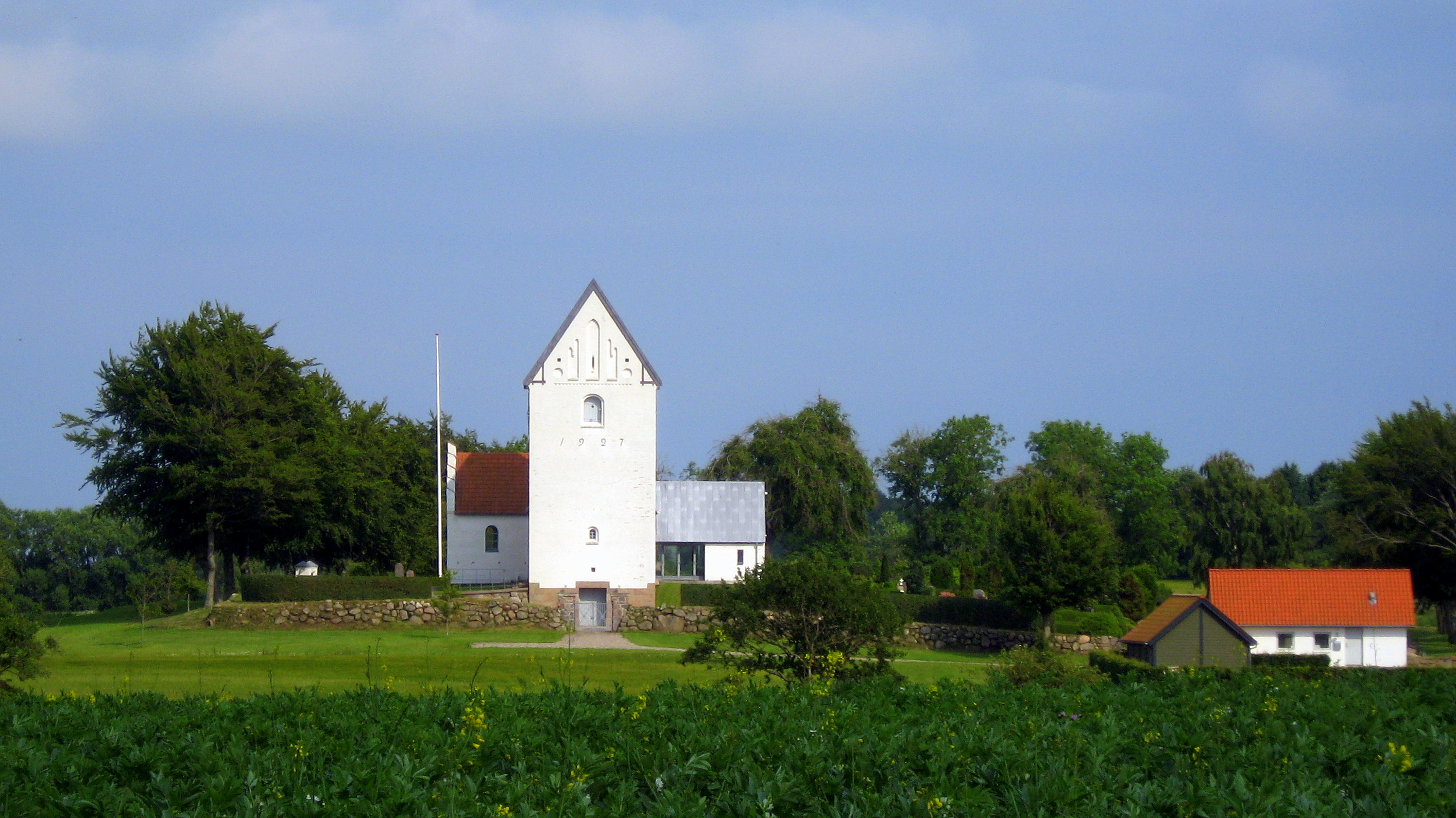 Ulsted Kirke, Aalborg Stift